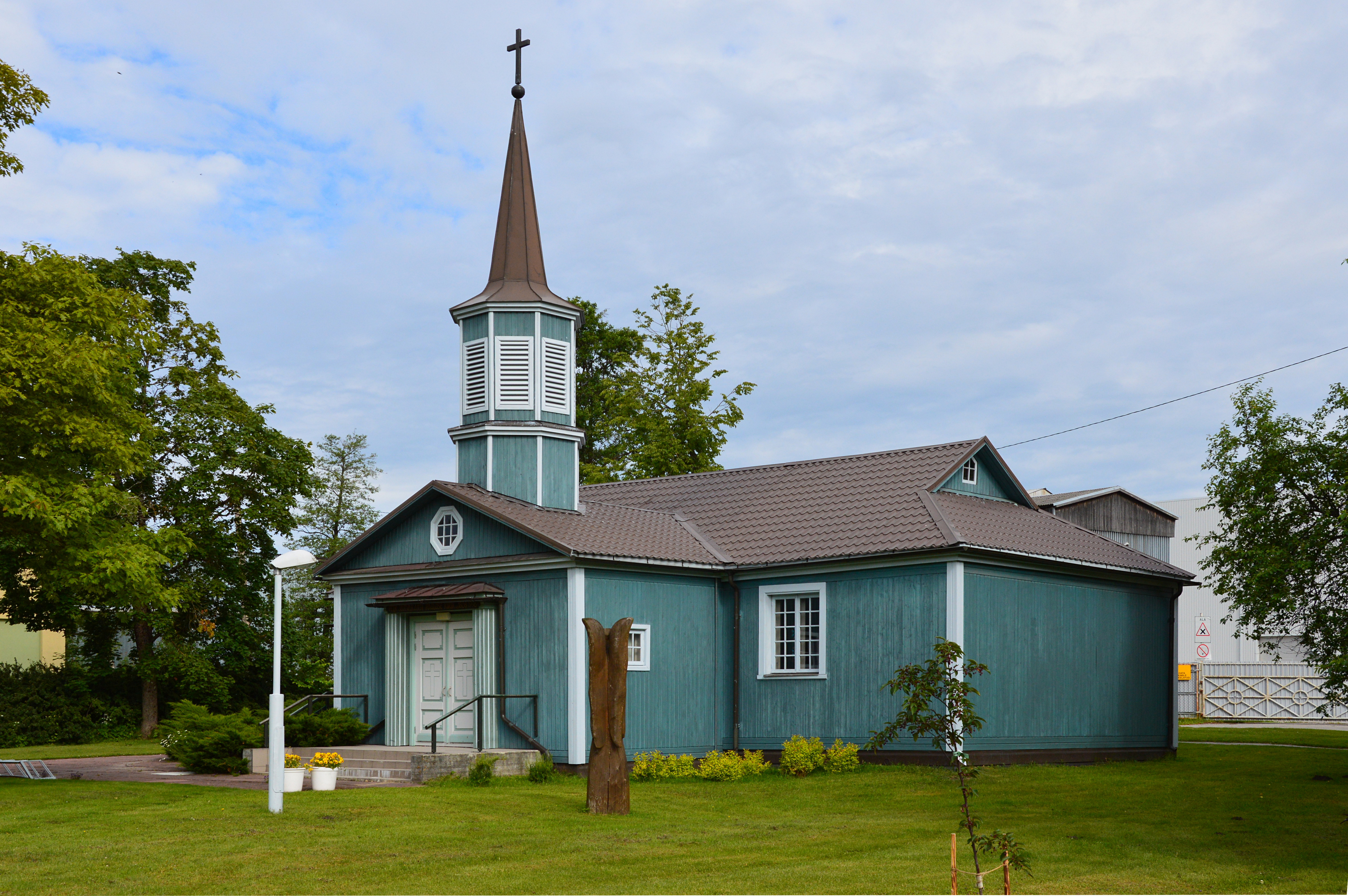 EELK Järvakandi Pauluse kirik